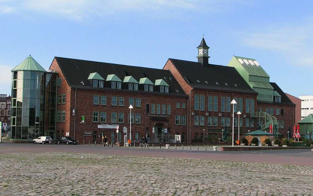 Beschreibung: Theater im Stadthafen von Rostock Fotograf: Darkone, 31. August 2005